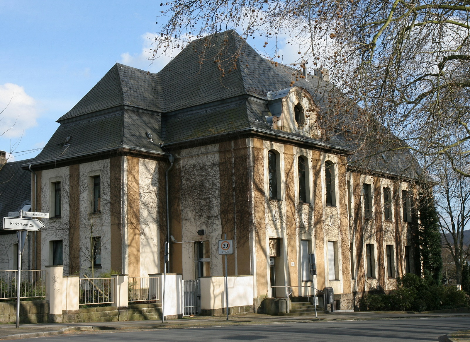 Amtsgericht Wetter (Ruhr) in der Stadt Wetter (Ruhr), Nordrhein-Westfalen.